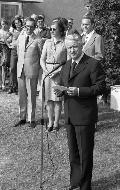 "Tag der Niedersachsen" in der Landesvertretung von Niedersachsen in Bonn